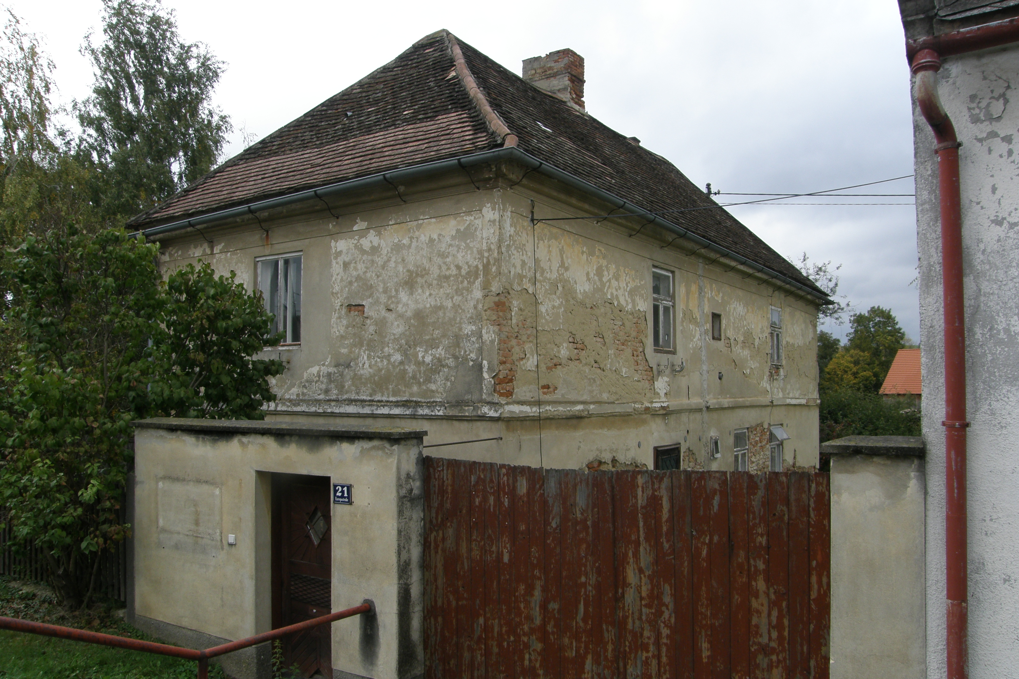 Pfarrhof von der Europastraße gesehen